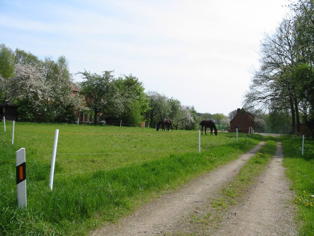 Wennekath